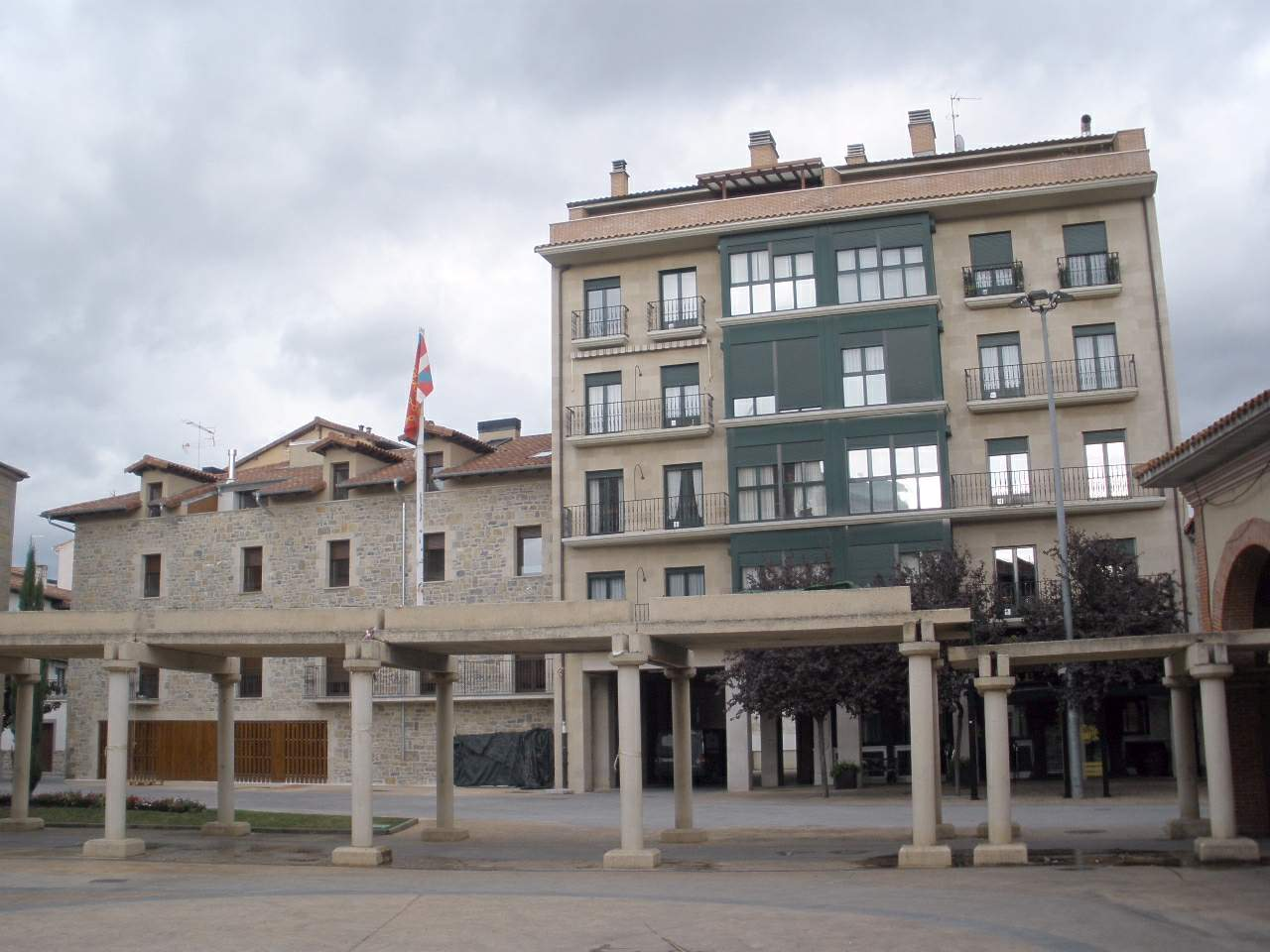 Huarte-Uharte (Navarra)